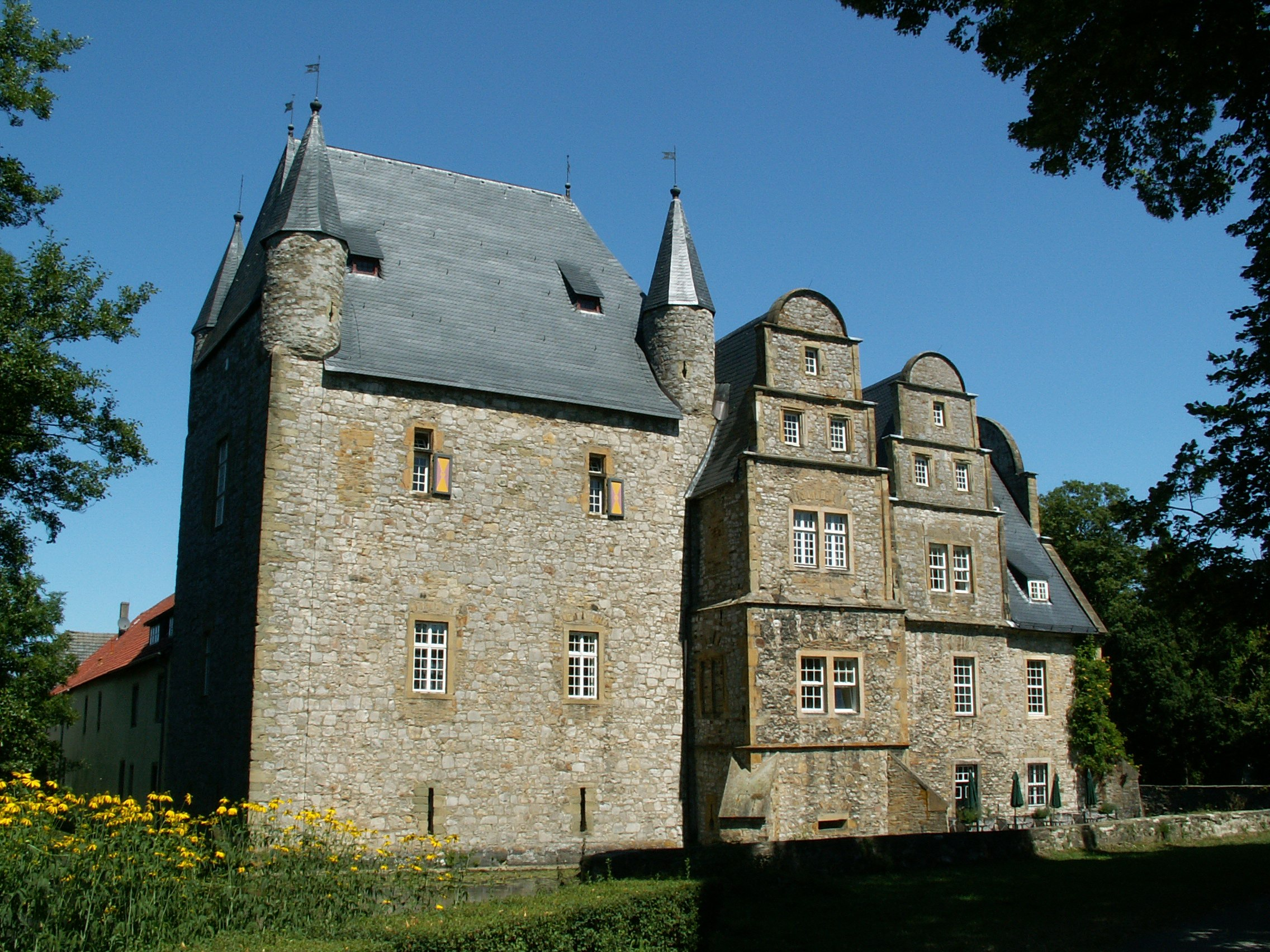 Schelenburg, Wasserschloss der Weserrenaissance in Bissendorf, Ansicht von Süden